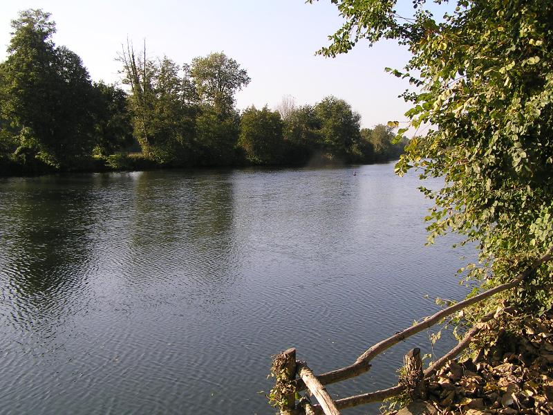 Fleuve Charente en amont de Cognac